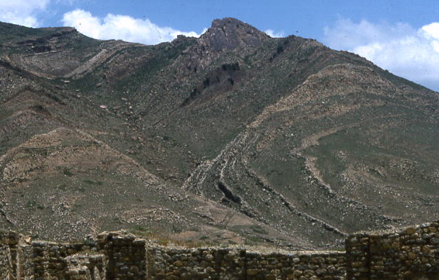 Kalâa des Béni Hammad, Algérie